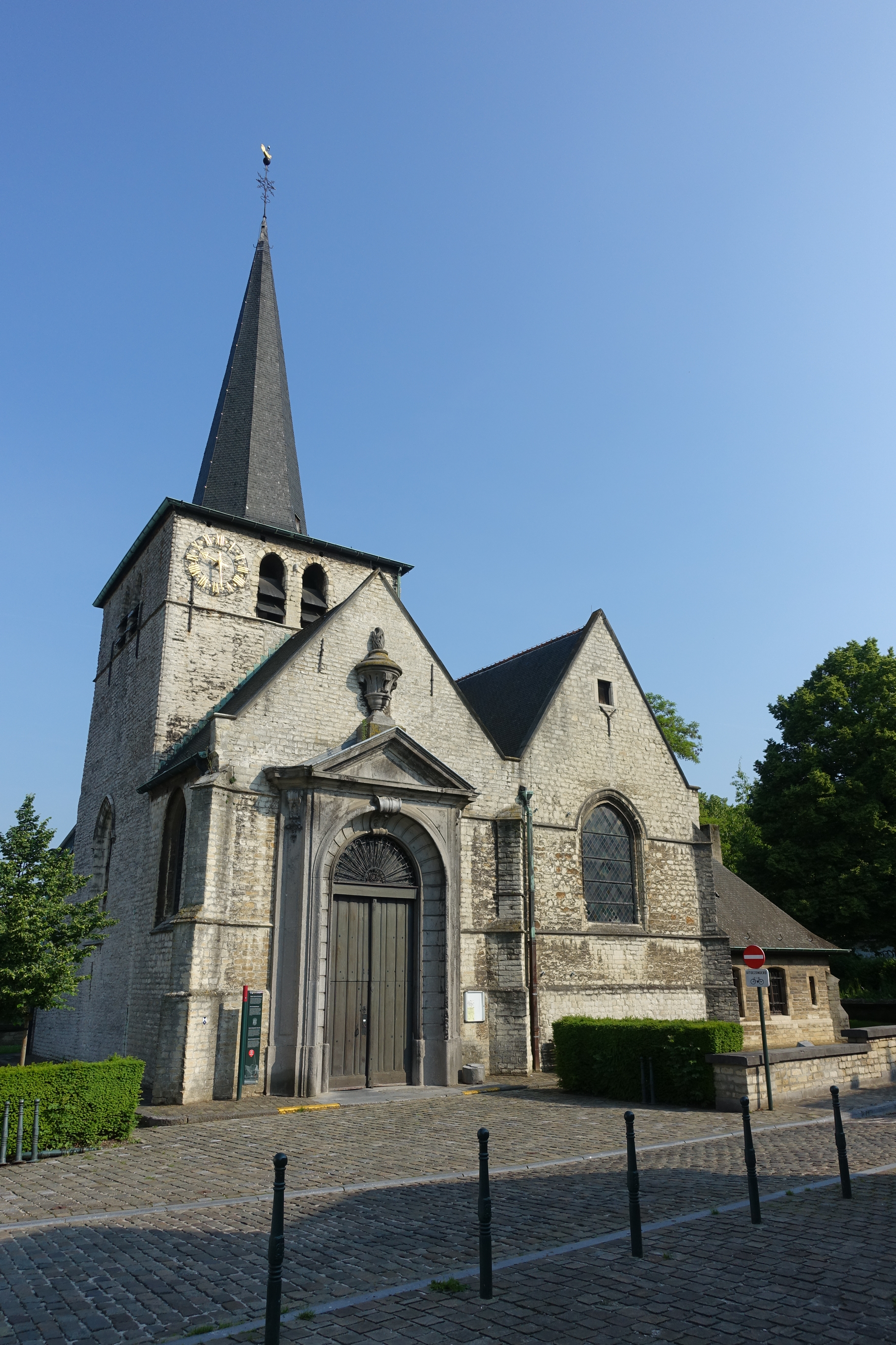 Kerk van Haren (Brussel) in 2016